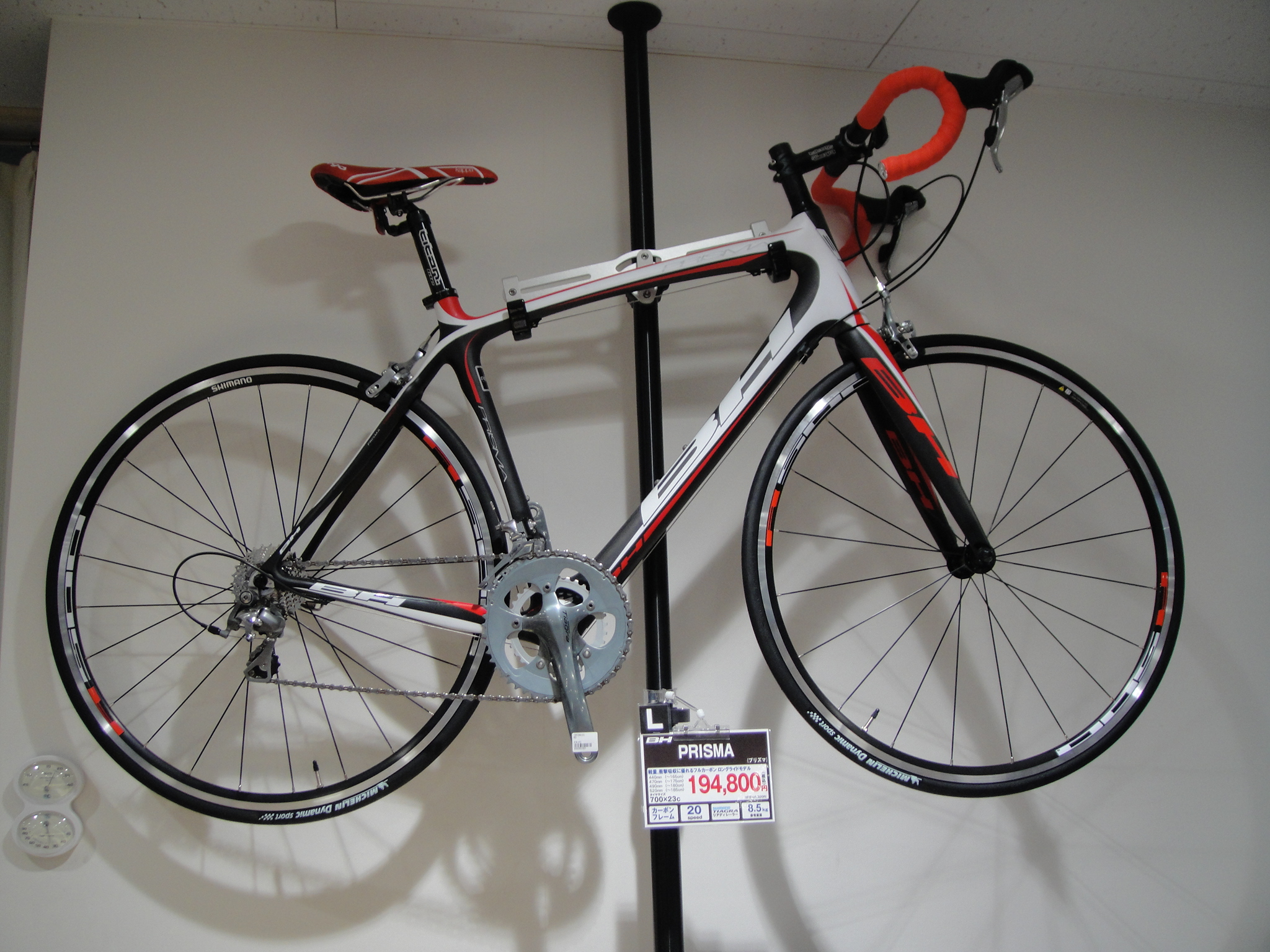 BHバイクスの2012年式PRISMA。